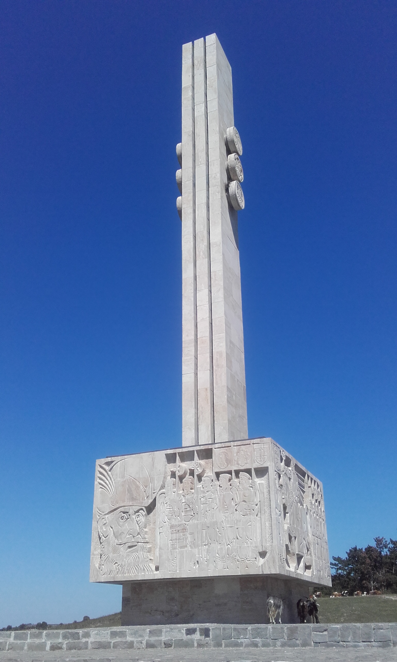 Az 1976. felavatott emlékmű magassága 26 méter. Mihai Viteazul 1601-es csatájának az emlékére amelyben legyőzte Báthory Zsigmondot. Egy 10 m magas emlékmű rekonstrukciója, amelyet 1928-ban állítottak, és amelyet 1941-ben a magyar hatóságok bontottak el, és Erdélybe kerültek.